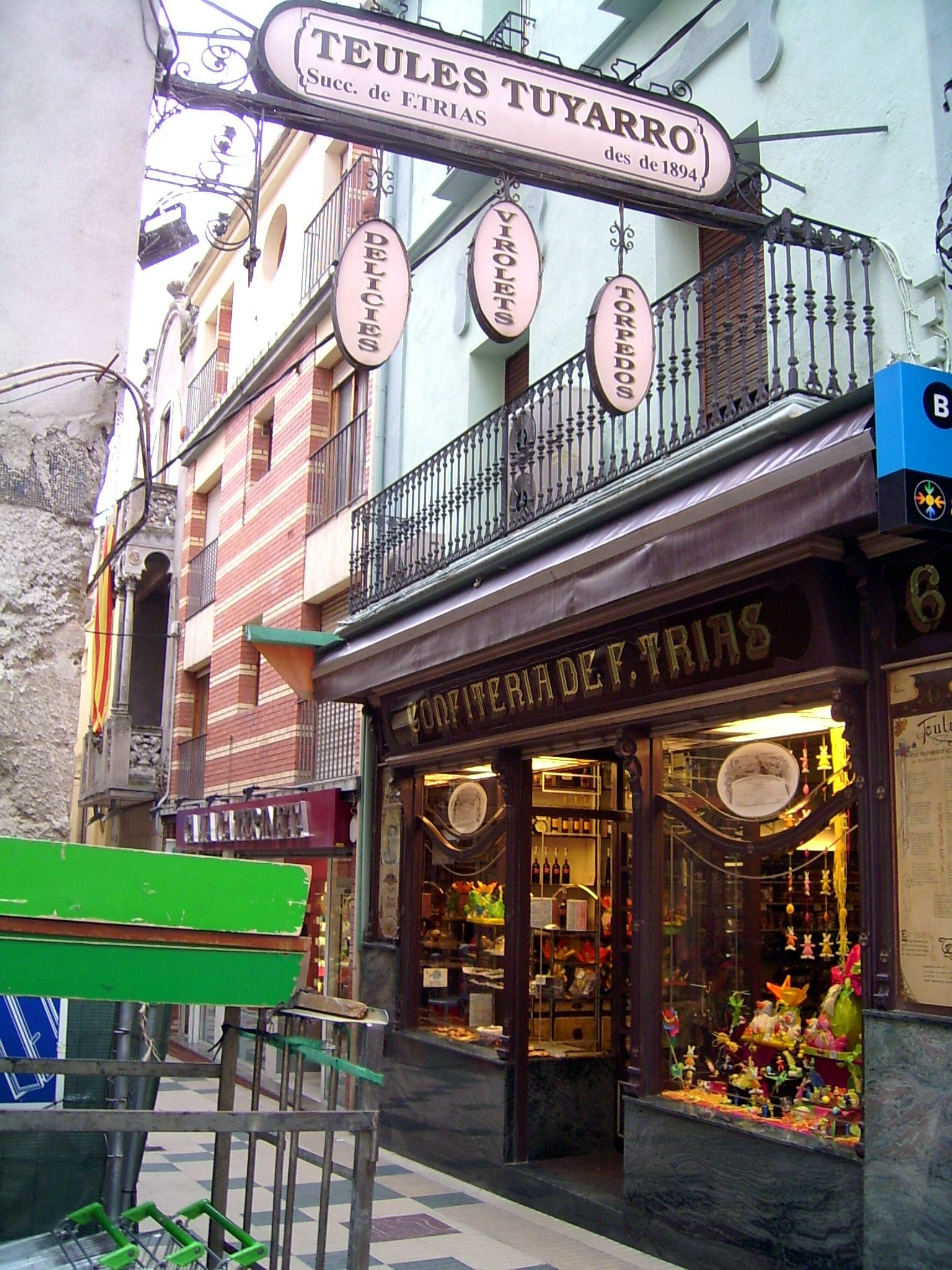 Pastisseria Teules Tuyarro, a Santa Coloma de Farners, a La Selva (Catalunya). Localització: Carrer del Pare Lluís Rodés, 6,17430 Santa Coloma de Farners, Girona